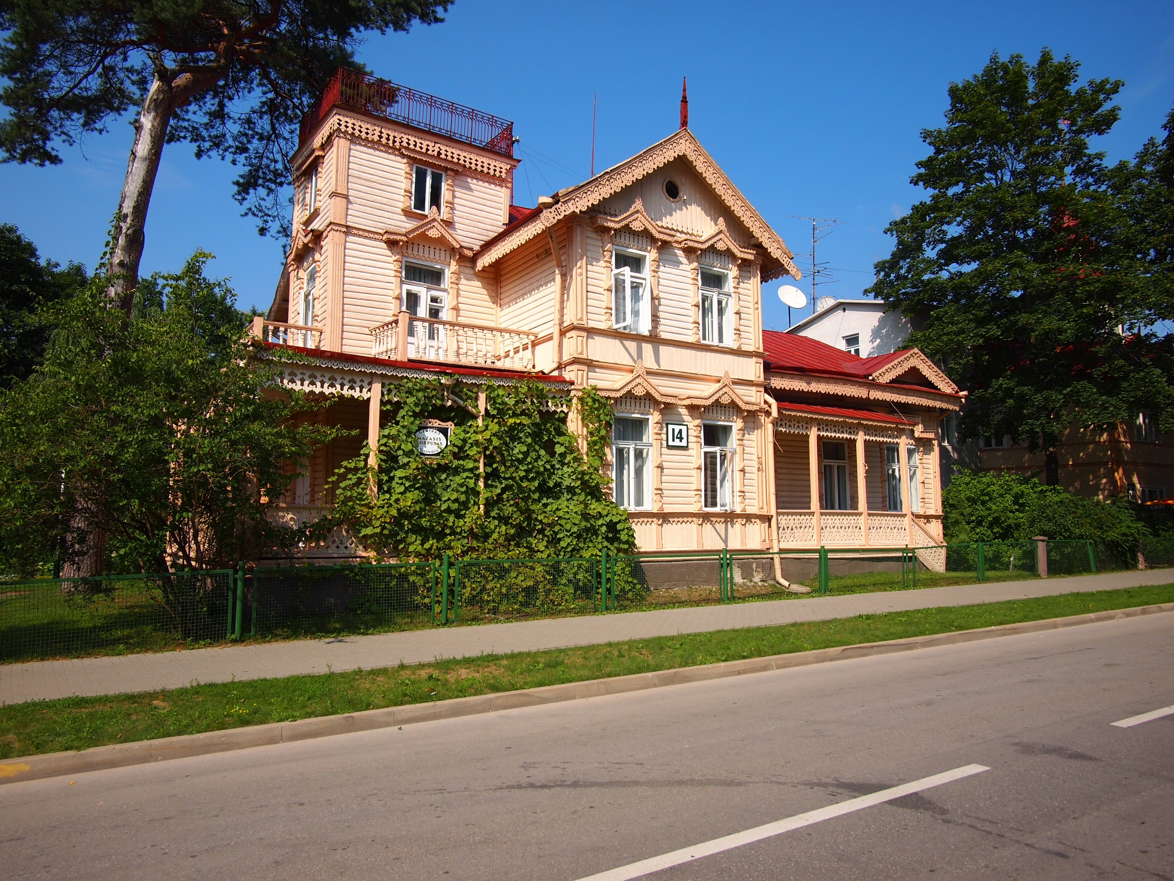 Druskininkai, Lithuania